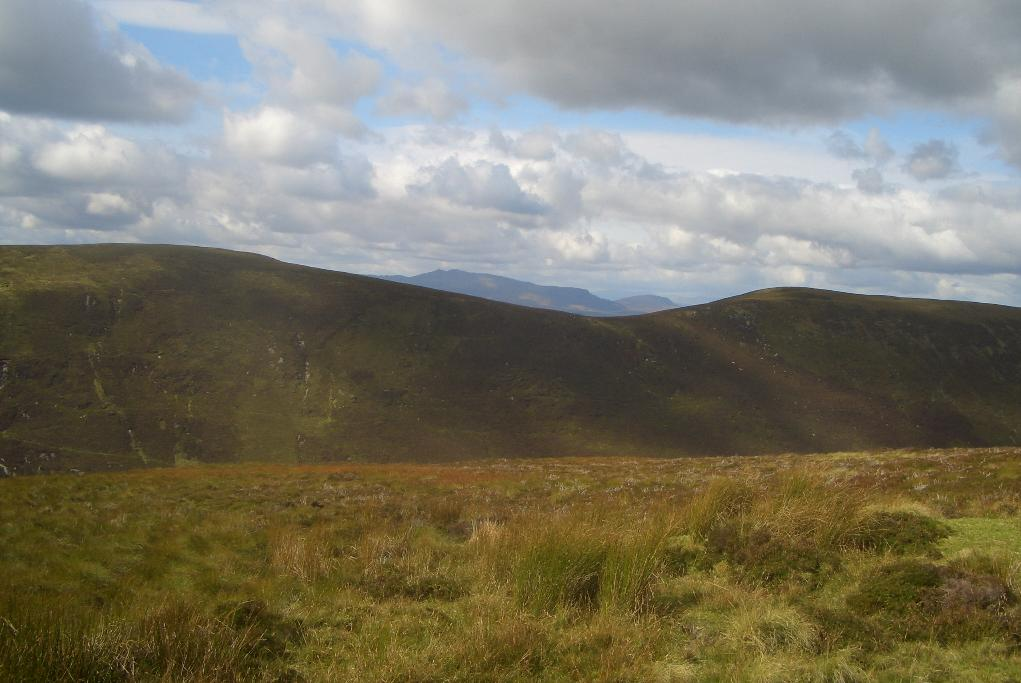 Foel Goch (Right) and Trum y Gwragedd(Left) from Pen y Boncyn Trefeilw